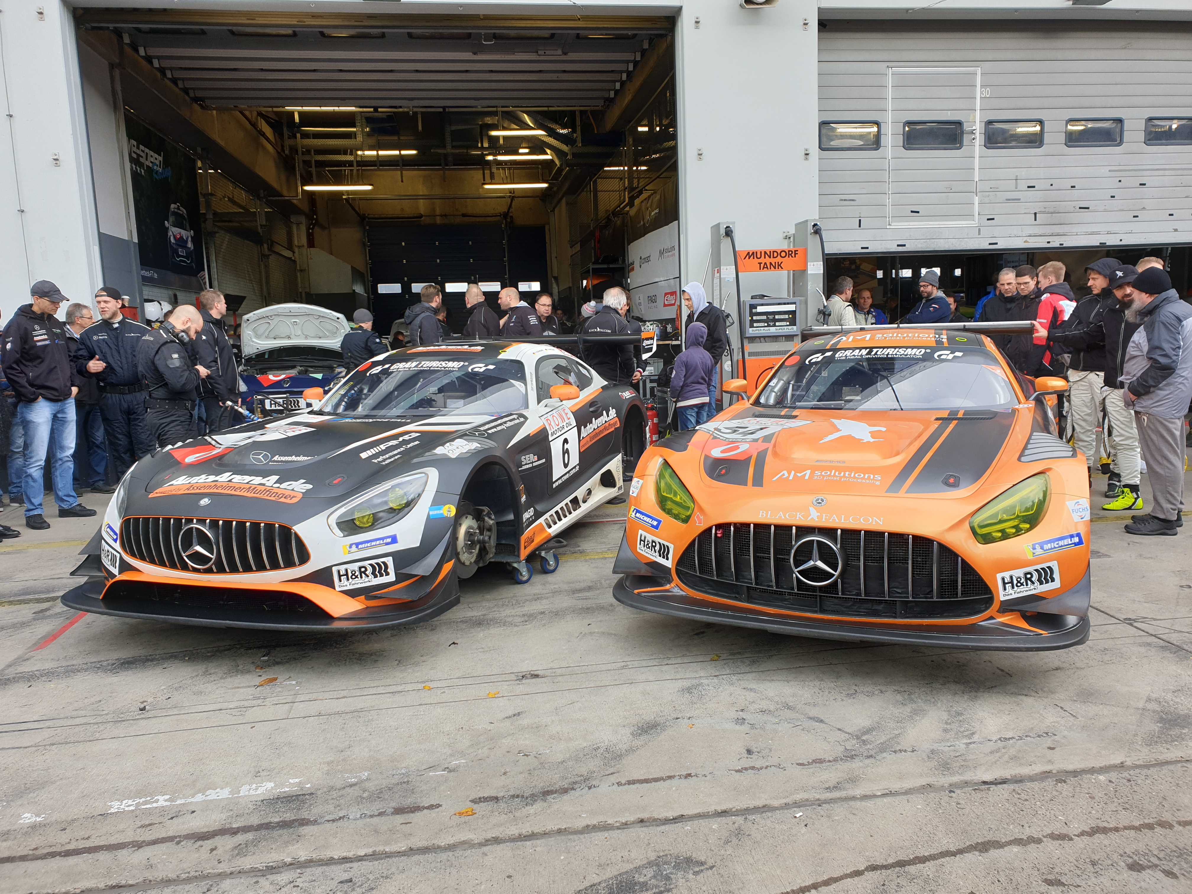 Mercedes AMG GT - Normal und EVO